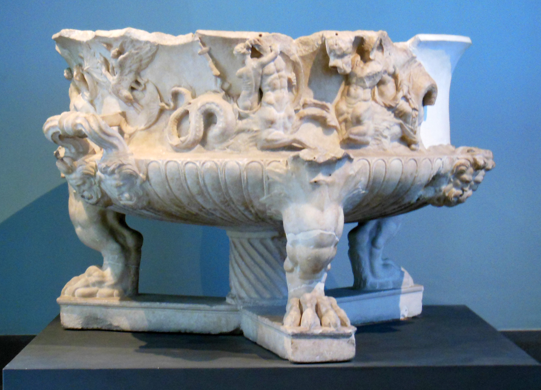 Museo nazionale romano, sede di palazzo Massimo, tazza neoattica in marmo pentelico, dall'Ospedale di Santo Spirito, lungotevere in Sassia. Opera probabilmente neoattica del I secolo a.C.. Num.cat. 69.